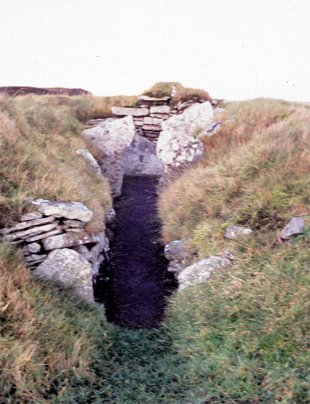 Cairn o'Get, Scotland